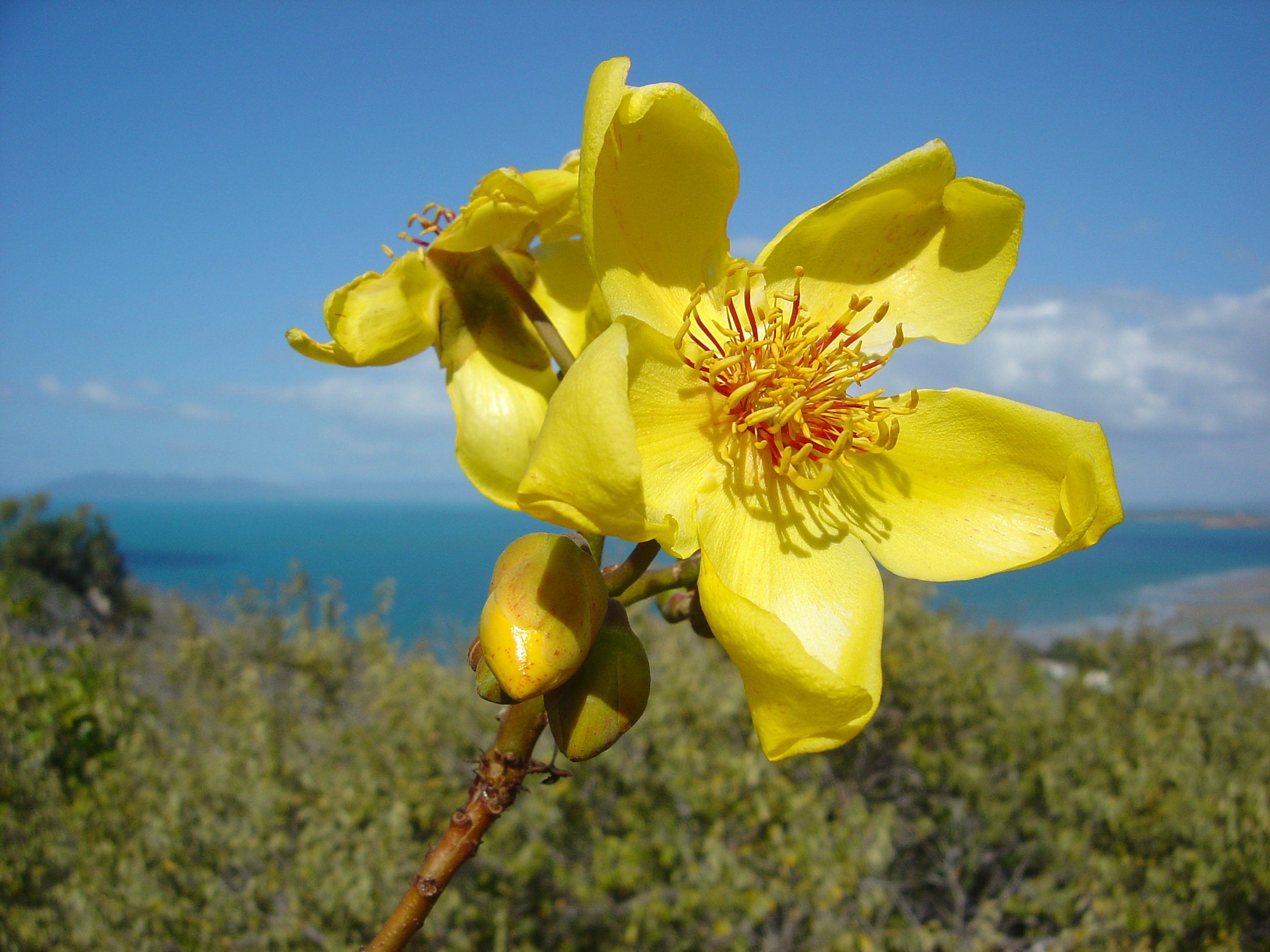 Yellow Kapok, nr Bowen. Cochlospermum grillivraei